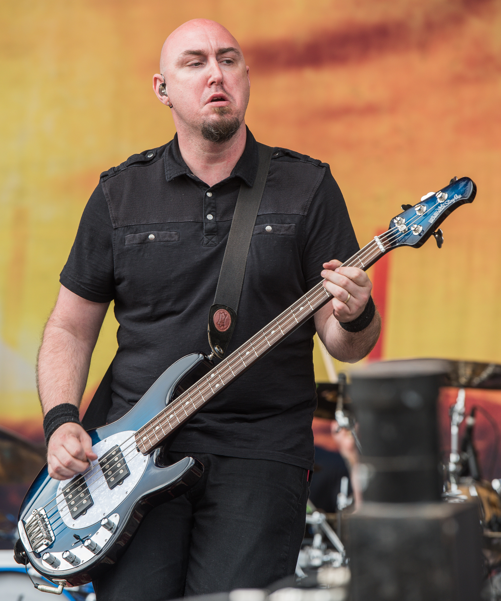 ARGO-Konzerte,Aaron Bruch,Breaking Benjamin,Festival,Konzert,Livekonzert,Livemusik,Musik,RiP,Rock im Park 2016,Seat Zeppelin Stage